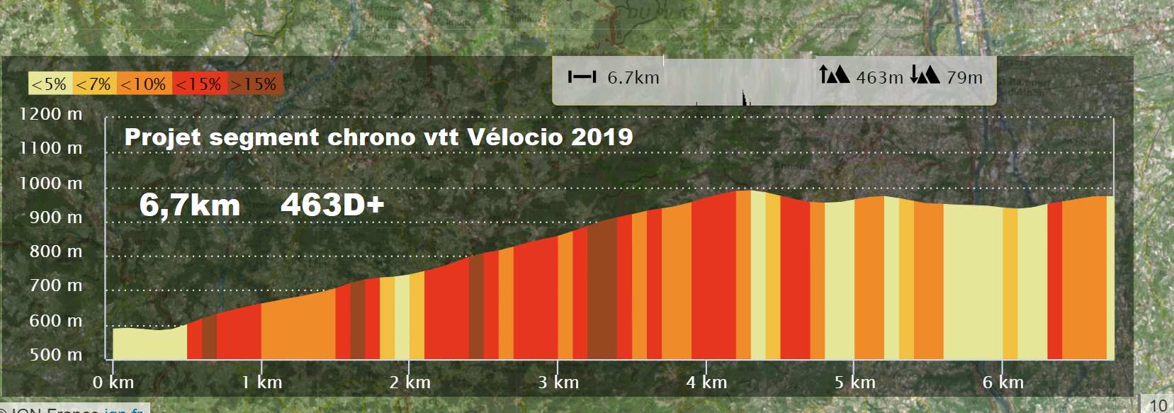 profil montée vtt